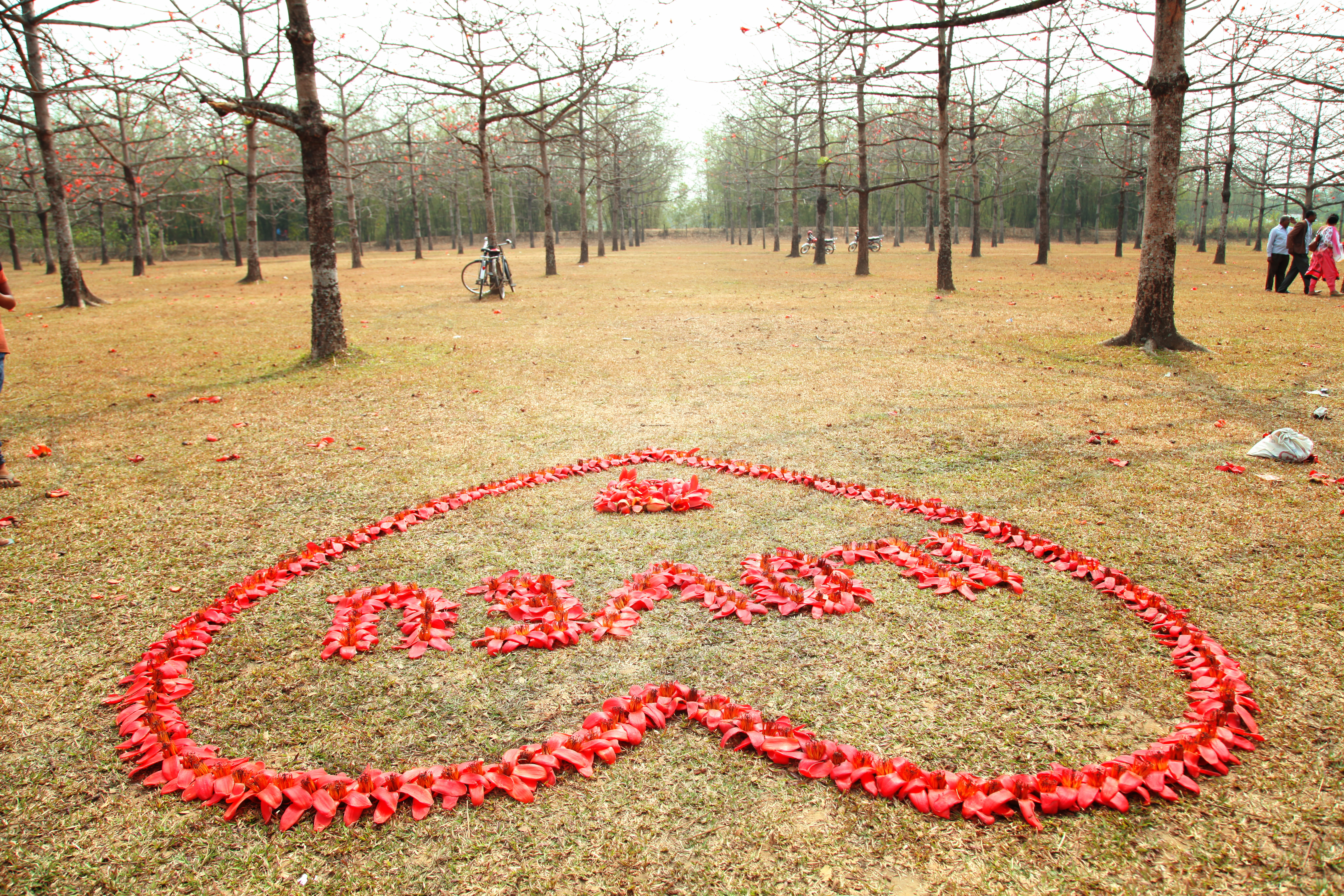 sylhet